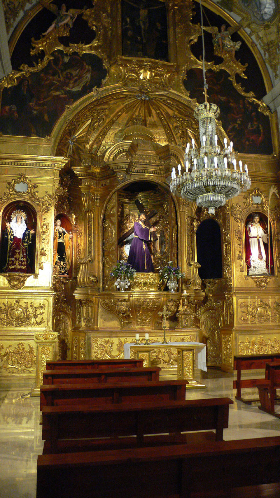 Retablo de la Capilla de la cofradía marraja, s.XVIII. Iglesia de Santo Domingo de Cartagena (España)